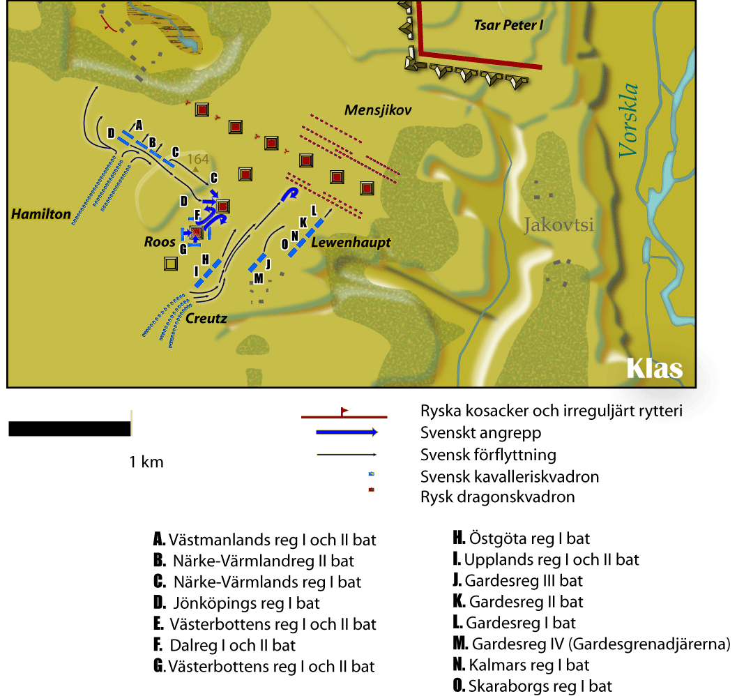 Det svenska infanteriet har intagit den första skansen och belägrar den andra. Creutz rytteri går fram för att försöka driva bort de ryska dragonerna. I det trånga utrymmet slås det första angreppet tillbaka. Källa: Karl XII på slagfältet 15 febr 2007 Illustrationer:Påfågel